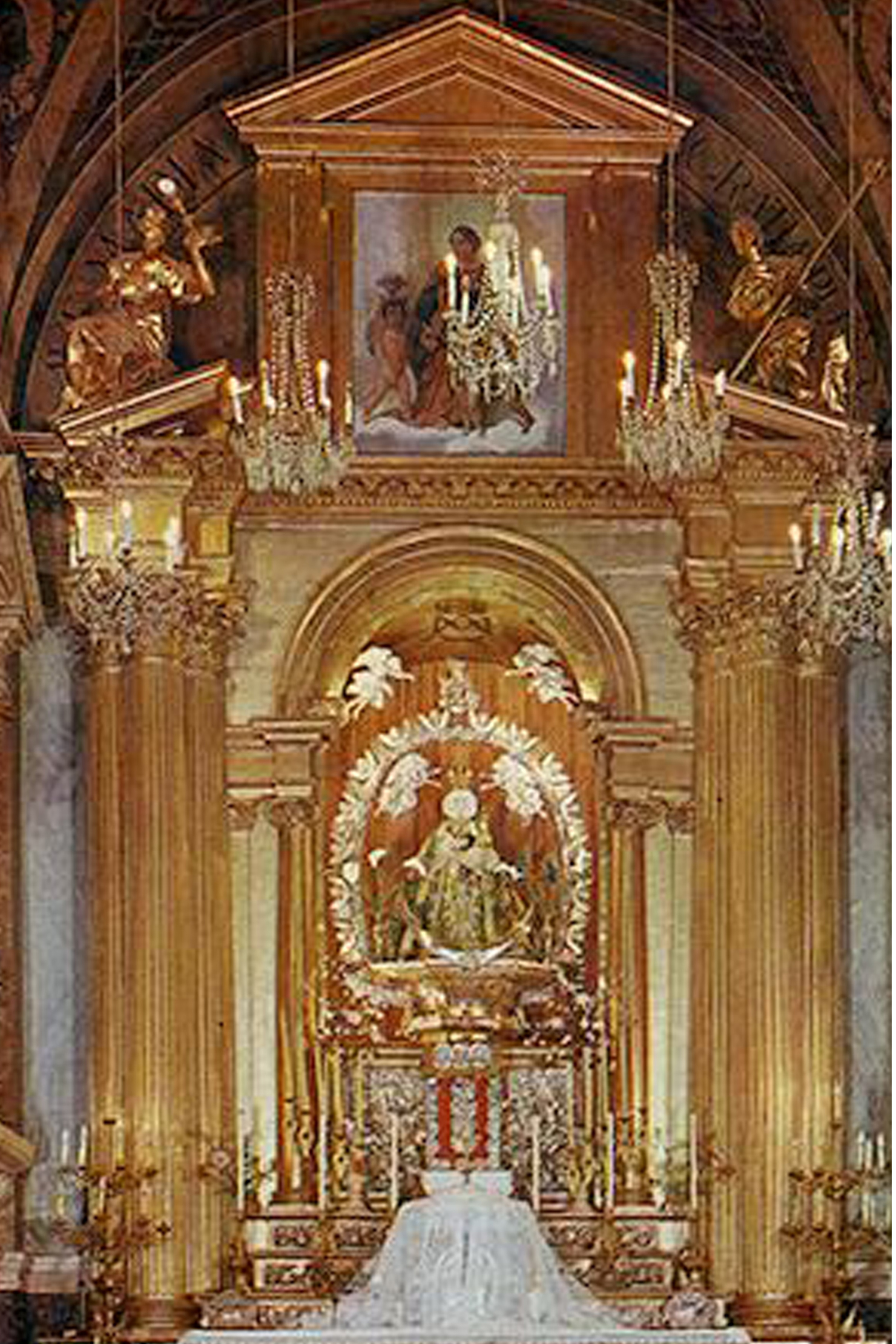 Aquest retaule central, juntament amb els quatre laterals i quatre magnifiques pintures, forma part del treball d'El Greco per aquest Santuari.